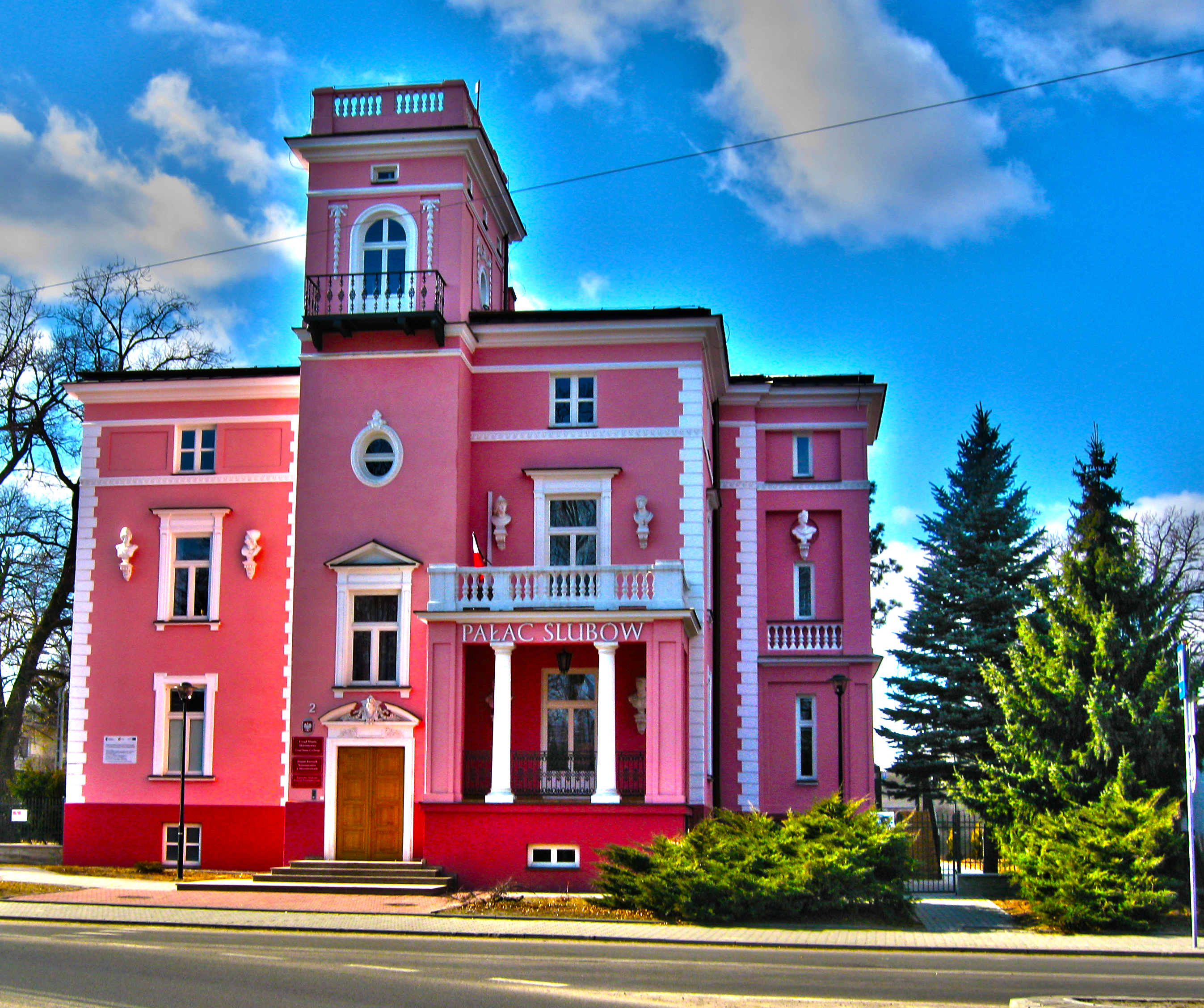 Willa Kozłowskich, marzec 2012 09.1976.